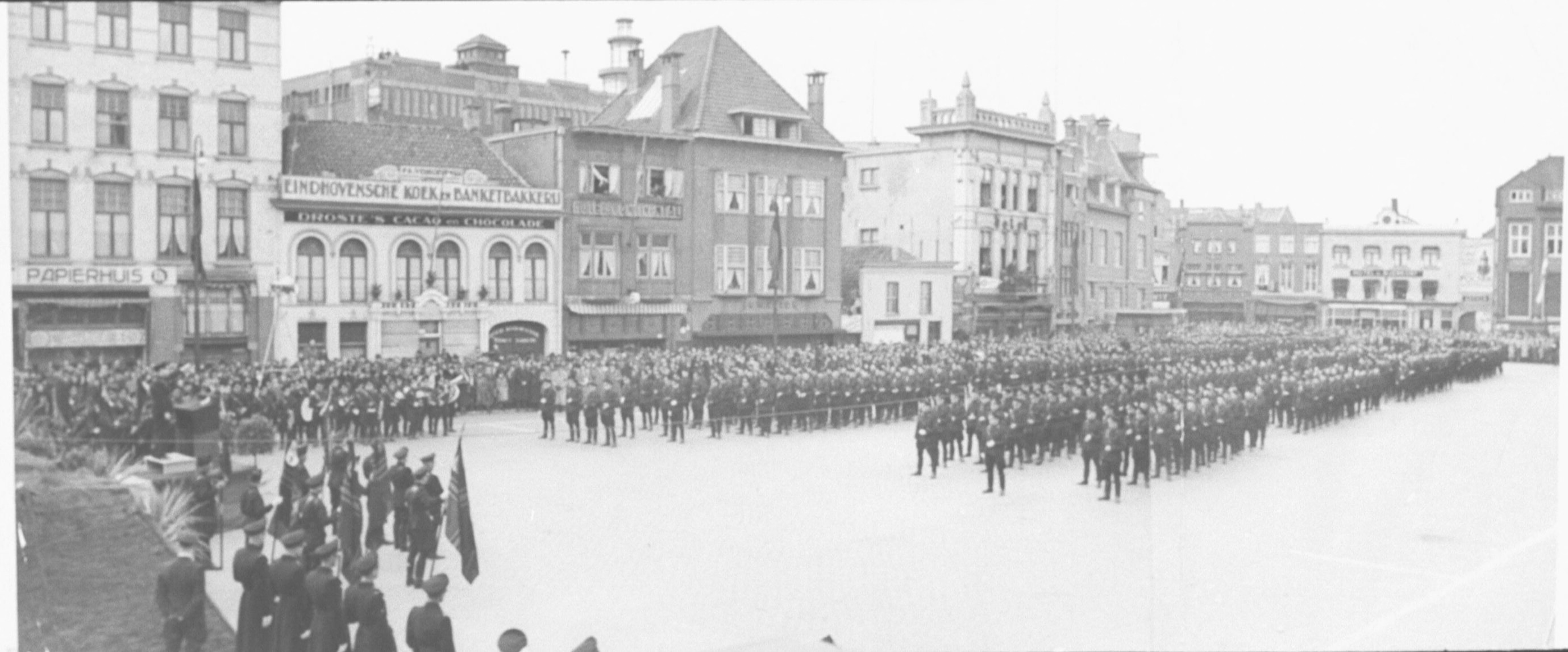 'Op zondag 27 april 1941 vond in Eindhoven een groote openluchtvergadering plaats, waarbij de aanwezige Leider een warm betoog tot zijn strijders richtte. Na afloop vond een defilé der WA plaats.' Deze foto is afkomstig uit het archief van de Fotodienst der NSB.